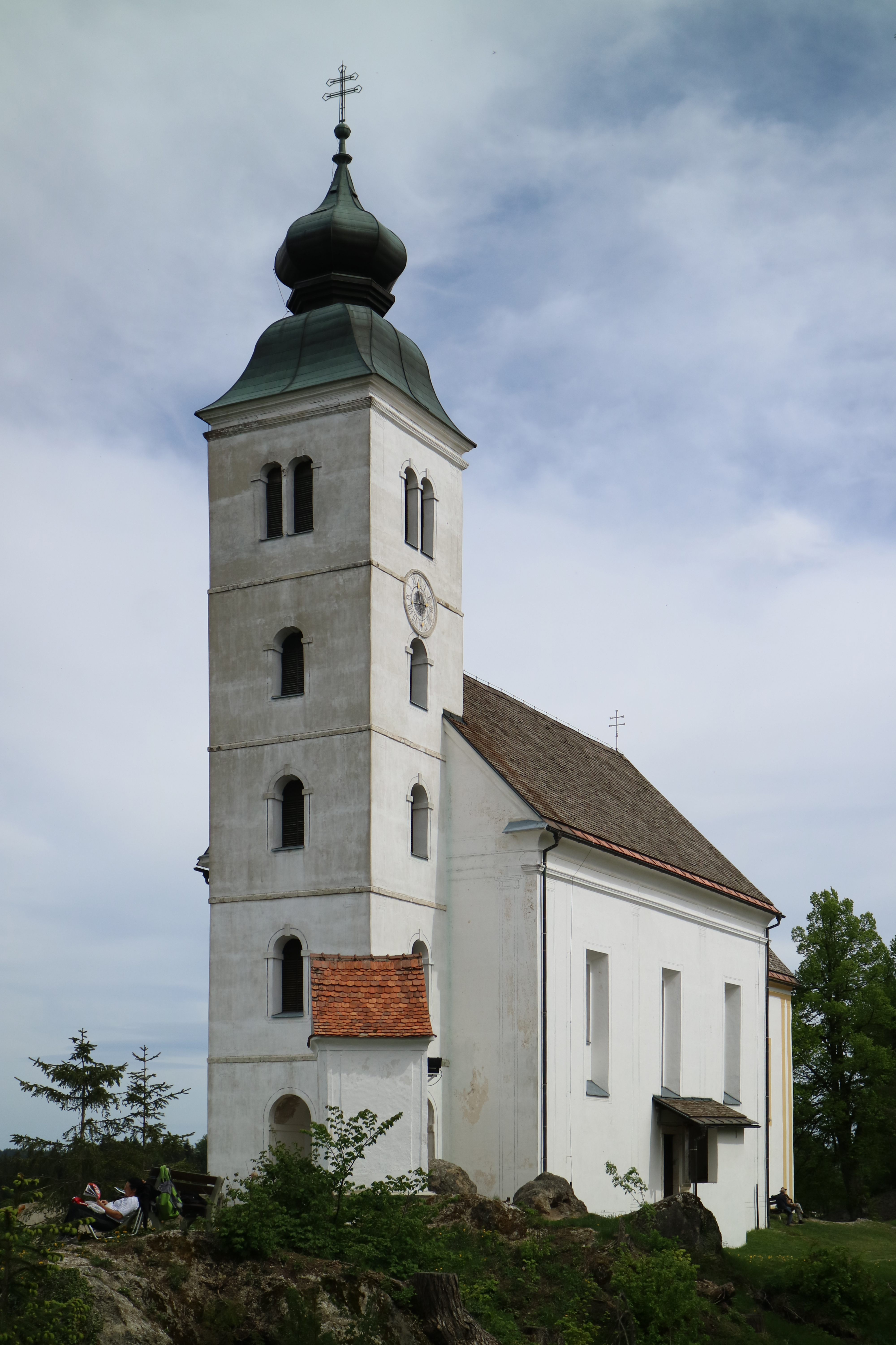 Sveti Duh na Ostrem vrhu (Kirche zum Heiligen Geist am Osterberg), Gemeinde Selnica ob Dravi, Slowenien